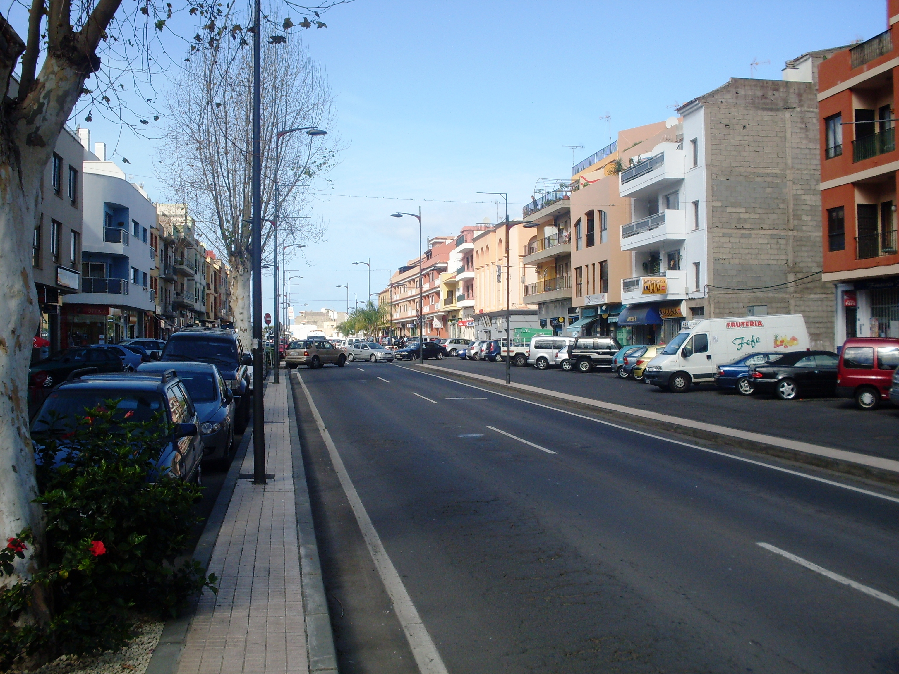 Carretera TF-217 a su paso por Santa Úrsula, donde se denomina Carretera España.